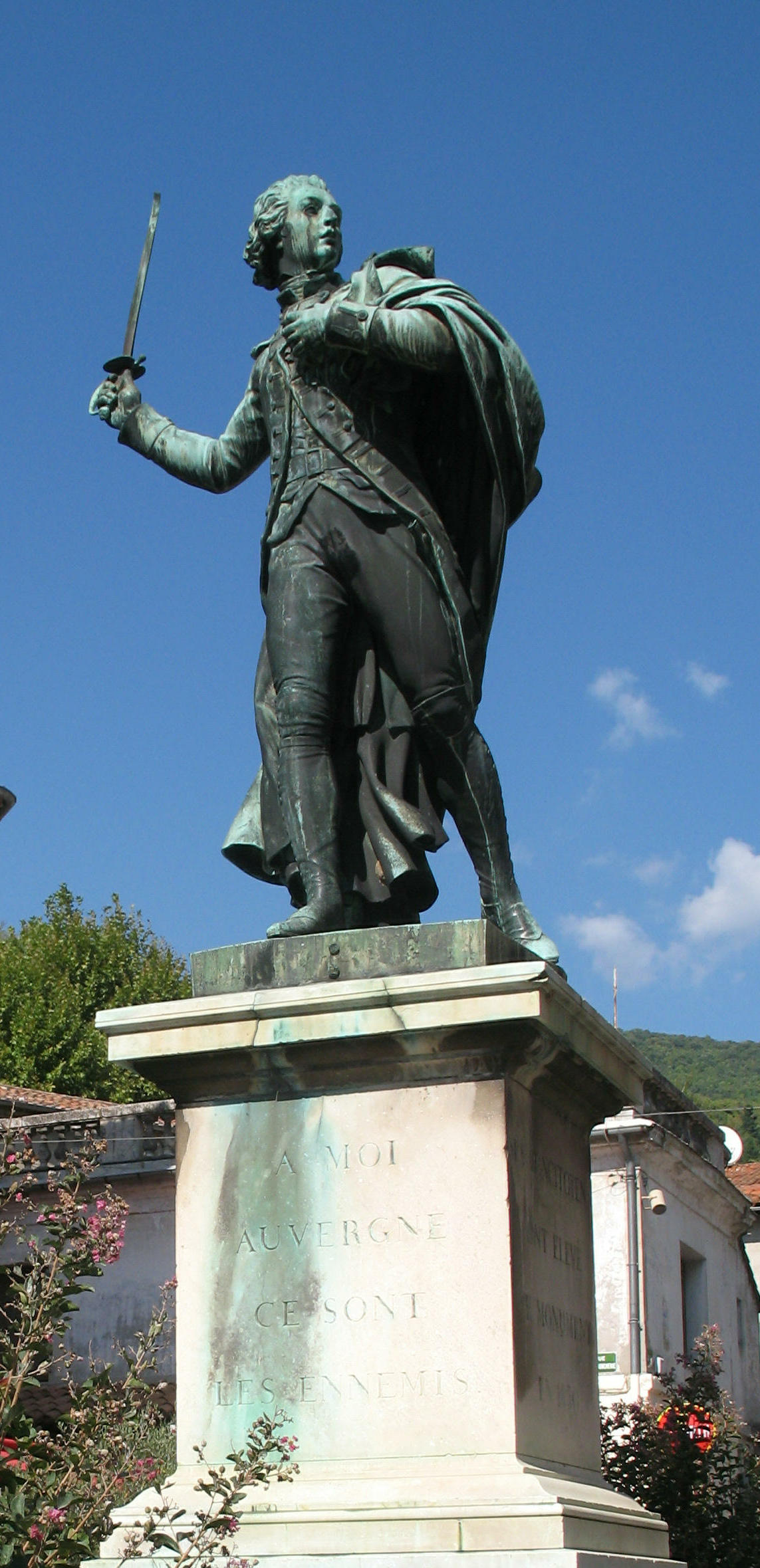 Statue du chevalier d'Assas au Vigan (Gard)